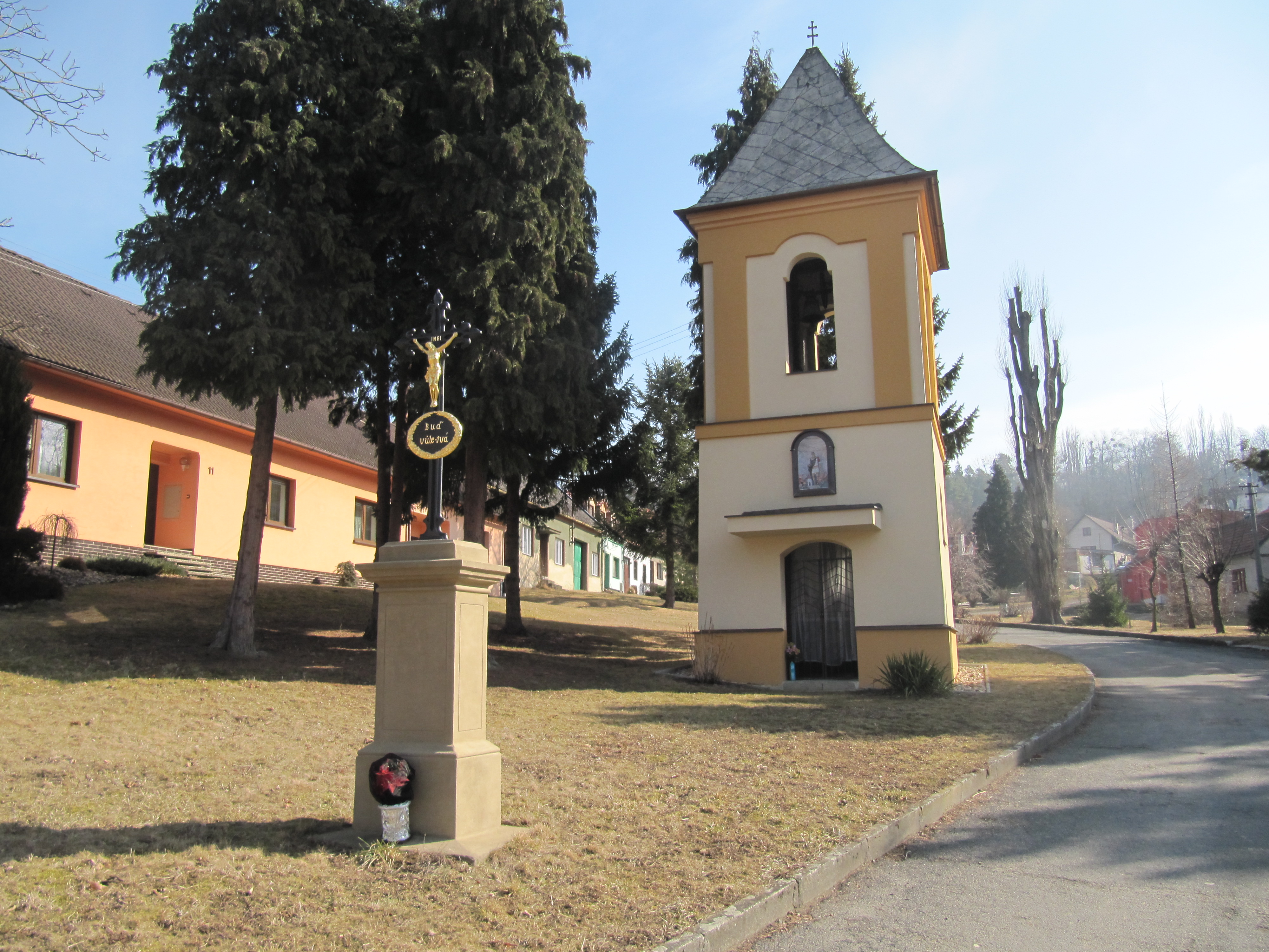 Lískovec (Koryčany)